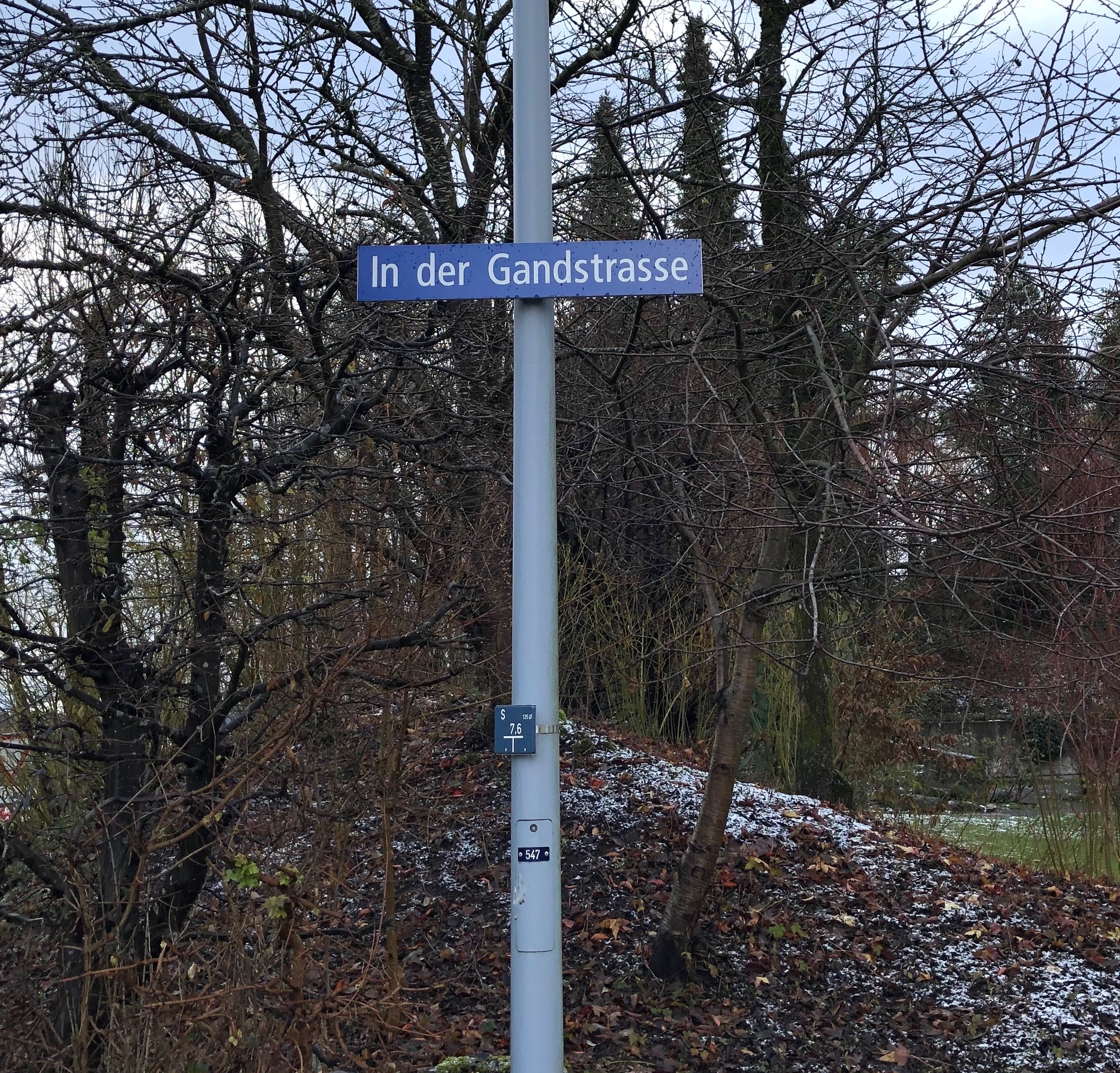 Strassenschild in Zumikon als Erinnerung an Hanns in der Gand